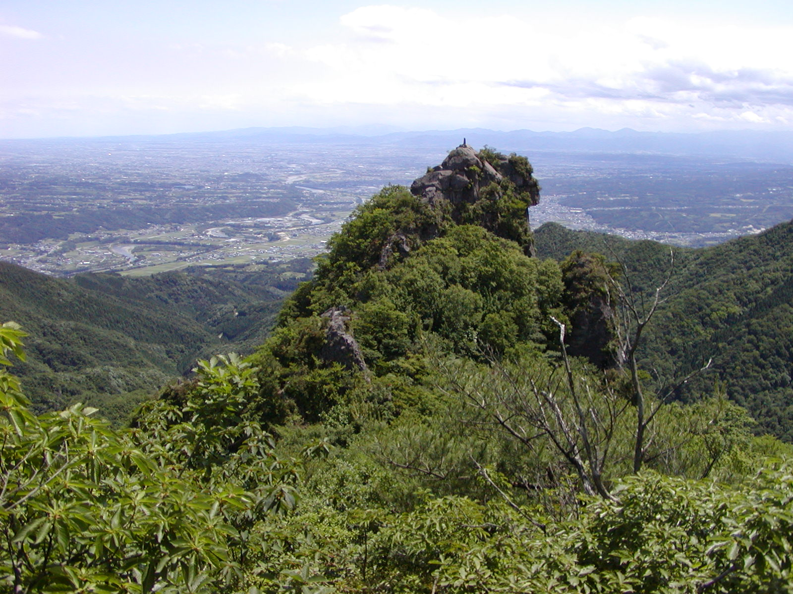 子持山の尾根から獅子岩を望む